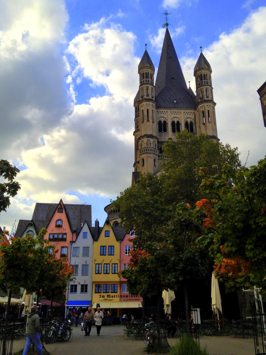 Cologne